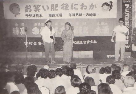 ラジオ熊本（RKK熊本放送）『お笑い肥後にわか』の公開録音。「おヨネ婆さんと長六息子、どこでも大人気のにわか」とのキャプションがある。